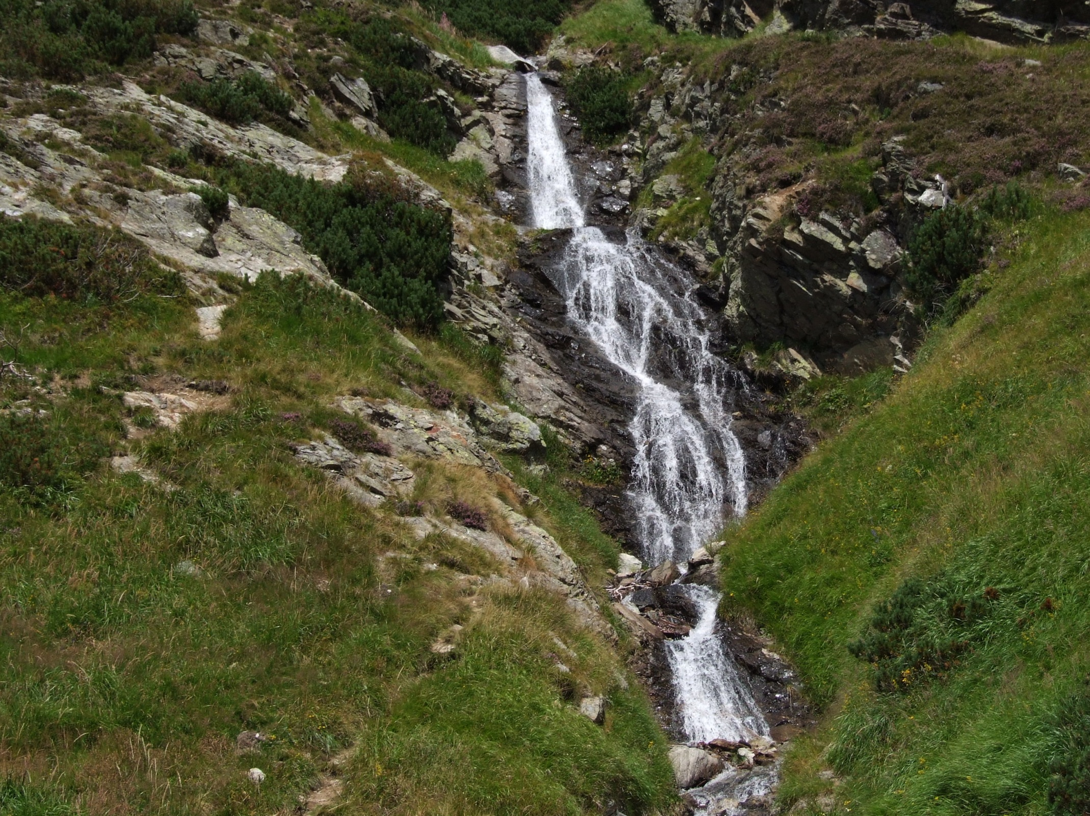 Szarafiowy Wodospad w Dolinie Żarskiej (Tatry Zachodnie)